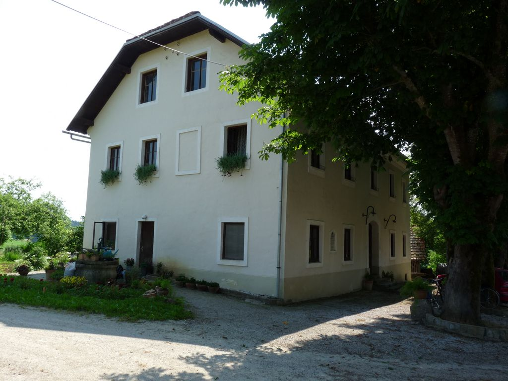 Rojstna hiša Friderika Barage v Mali vasi pri Trebnjem